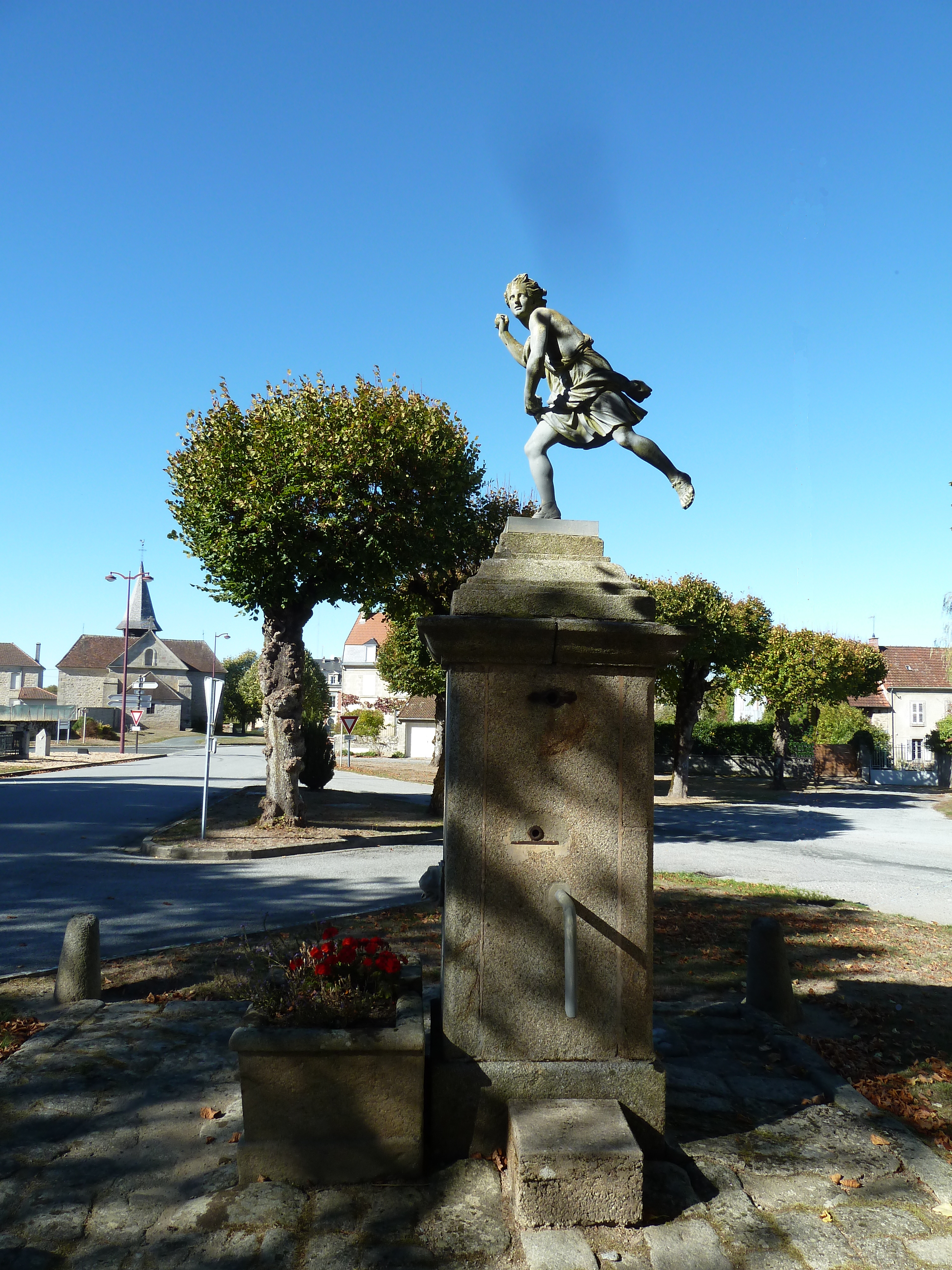 Statue-Hippomene